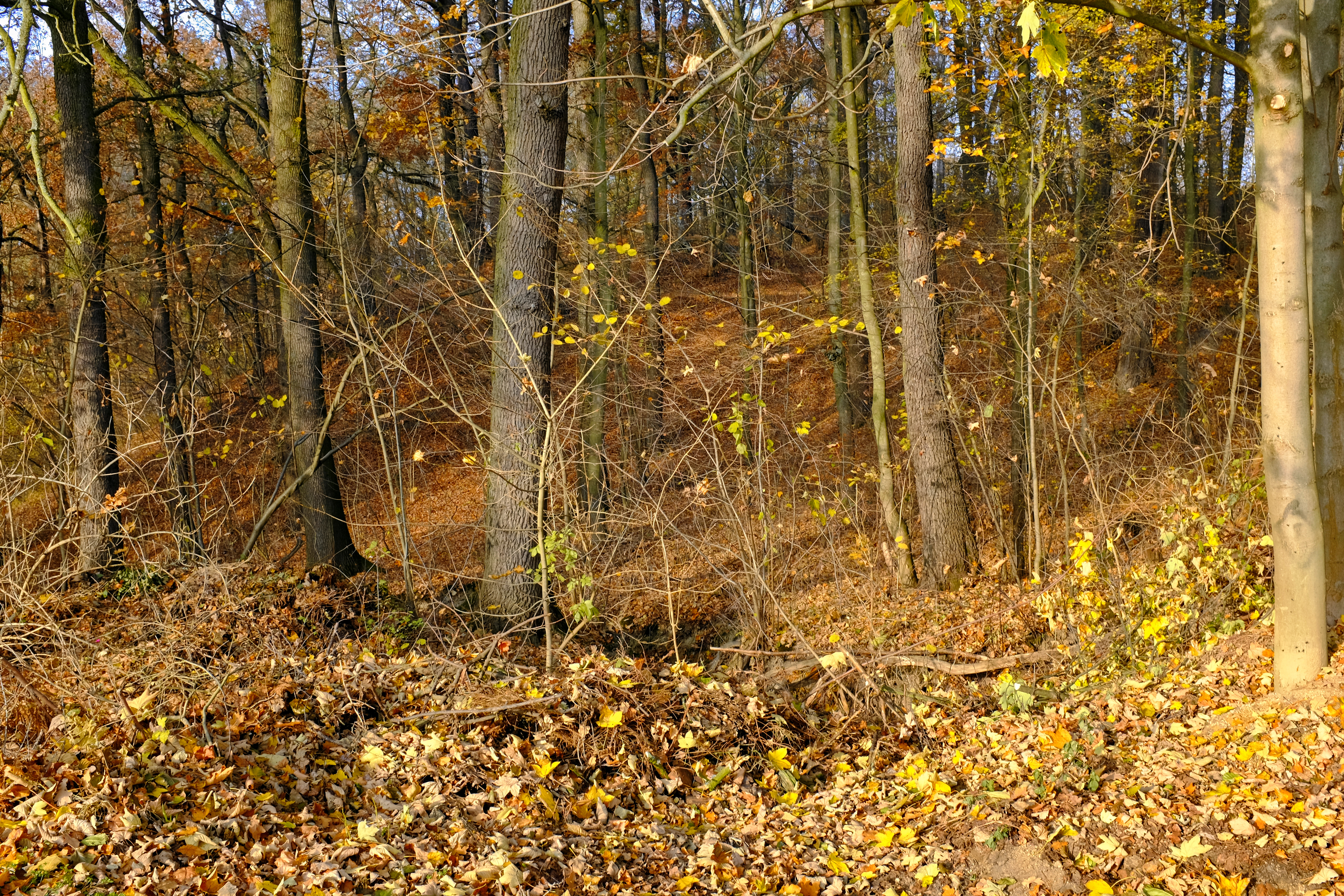 Tvrziště, Ve východní části zámeckého parku ve svahu nad rybníkem, Kaceřov (okres Sokolov).